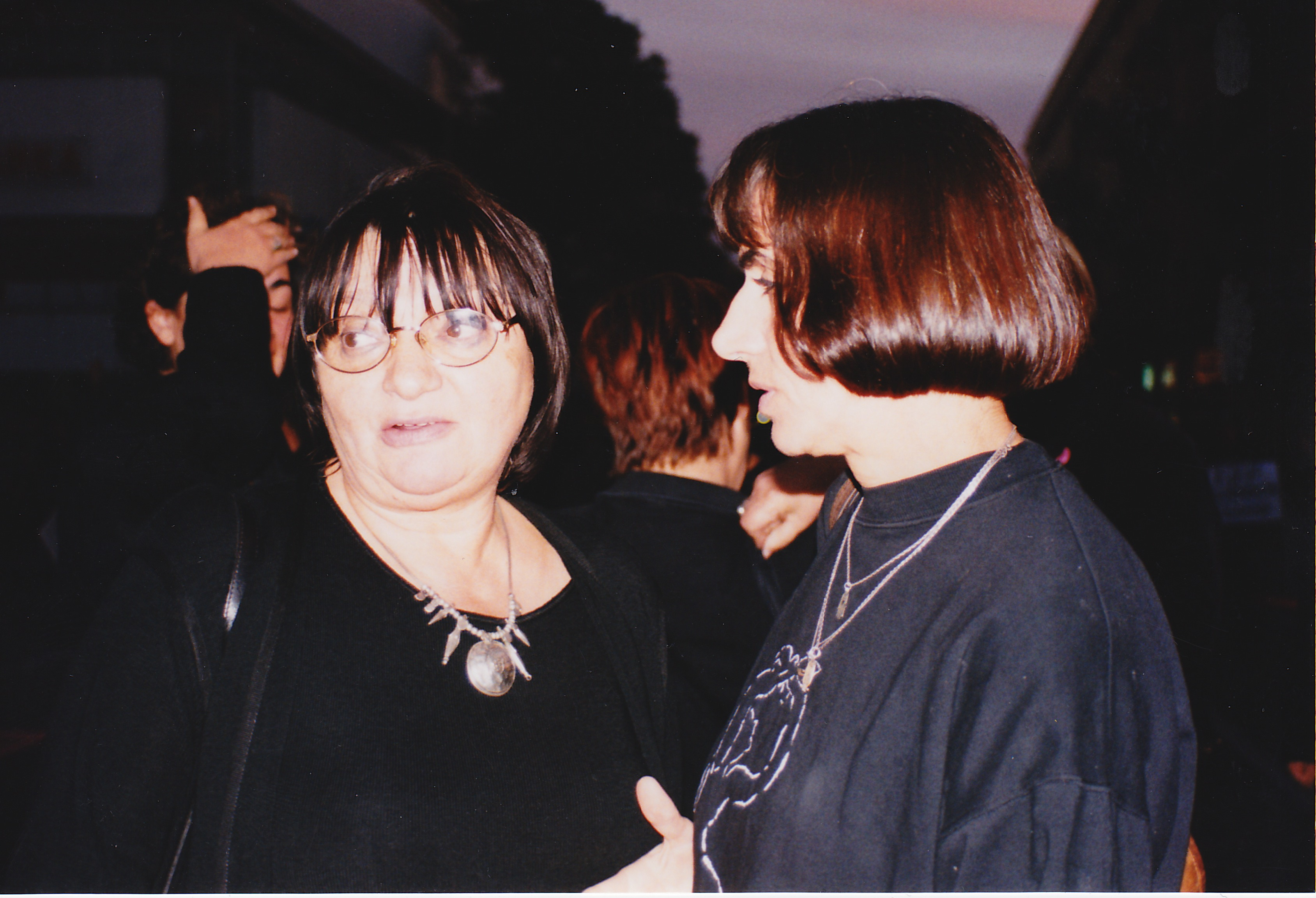 IX Encuentro Internacional de Mujeres de Negro. Ulcinj, Montenegro. Septiembre-Octubre - 1999